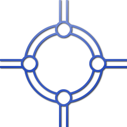 Een schema van een magische rotonde, gemaakt door mezelf.